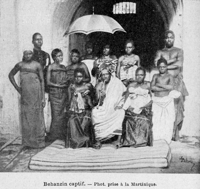 Behanzin captif. Photo prise à la Martinique